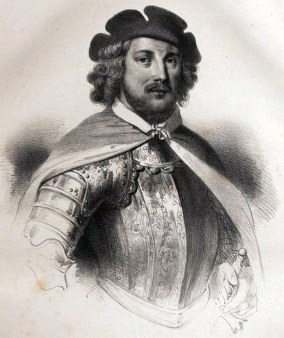 Jean de Béthencourt - francuski żeglarz, odkrywca i zdobywca połowy archipelagu Wysp Kanaryjskich.